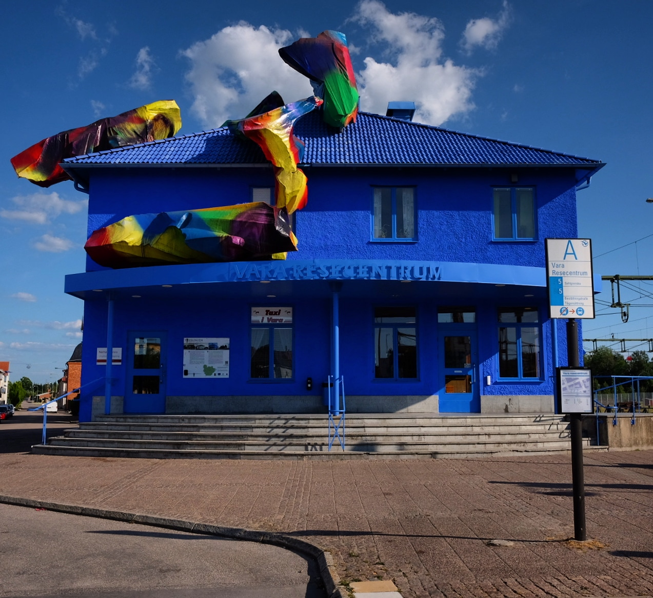 Vara järnvägsstation.